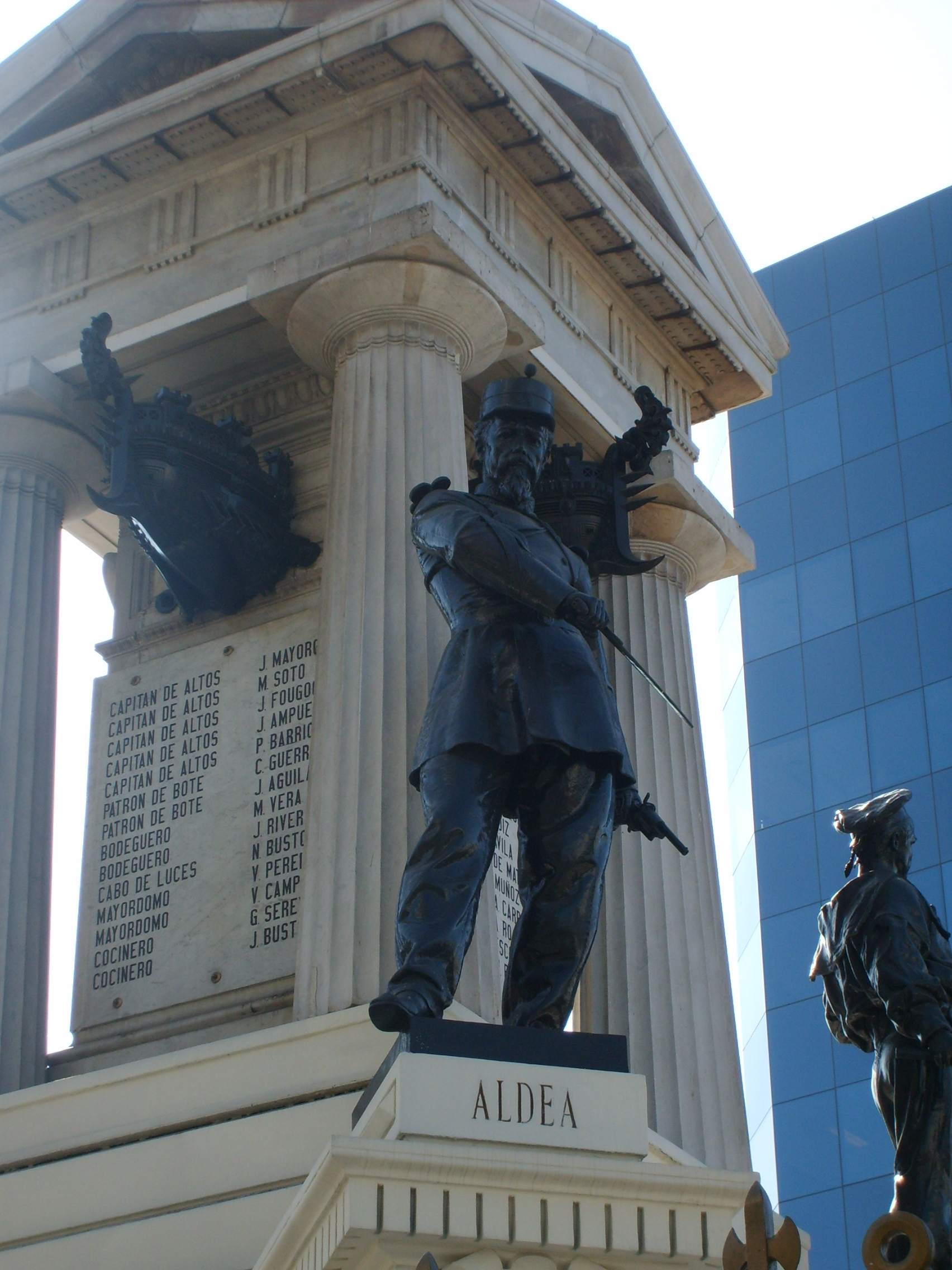 Estatua de Aldea en el Monumento a los Héroes de Iquique en la Plaza Sotomayor de Valparaíso